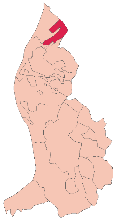 Municipalities of Liechtenstein: Schellenberg